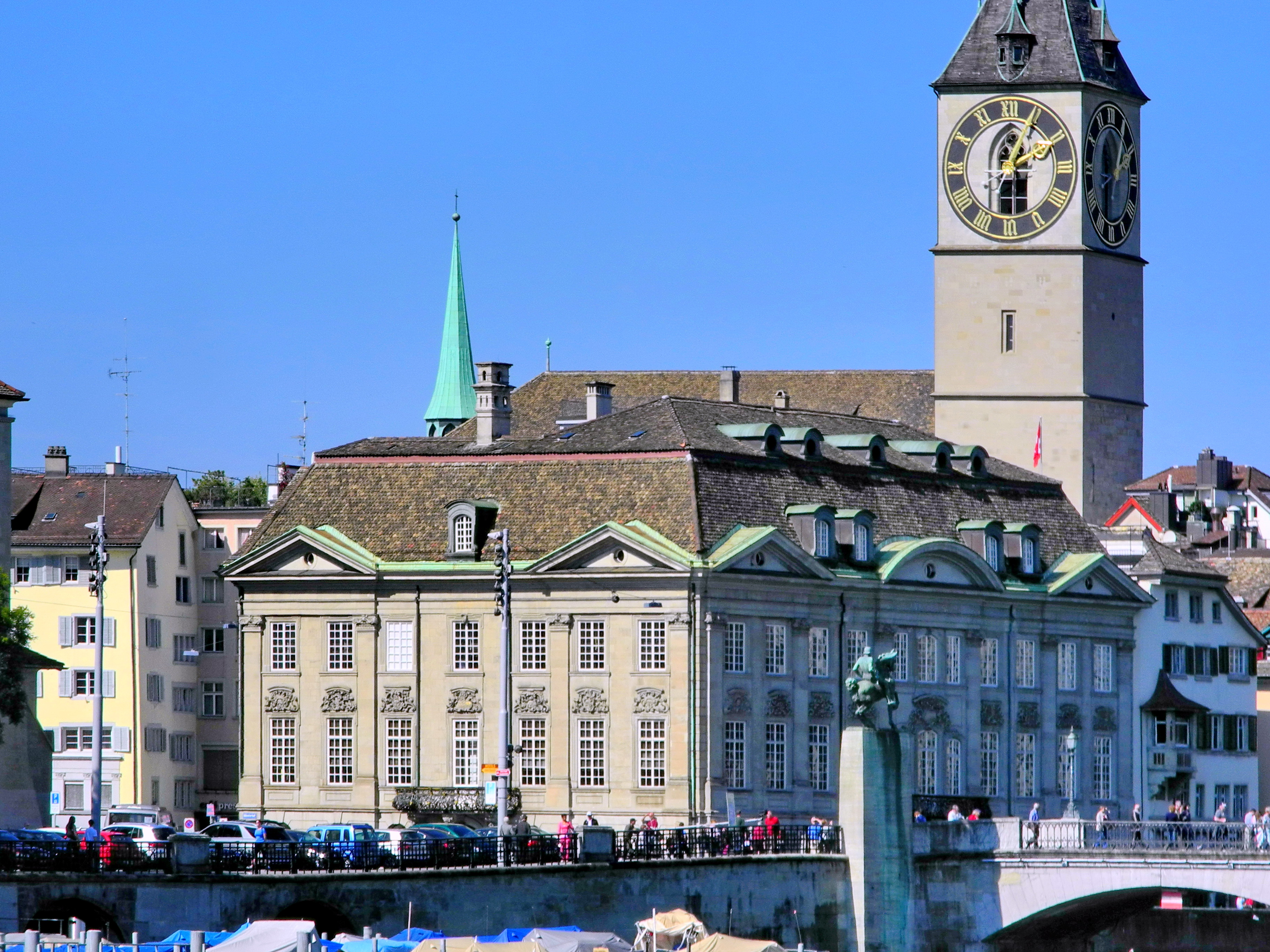 Zunfthaus zur Meisen